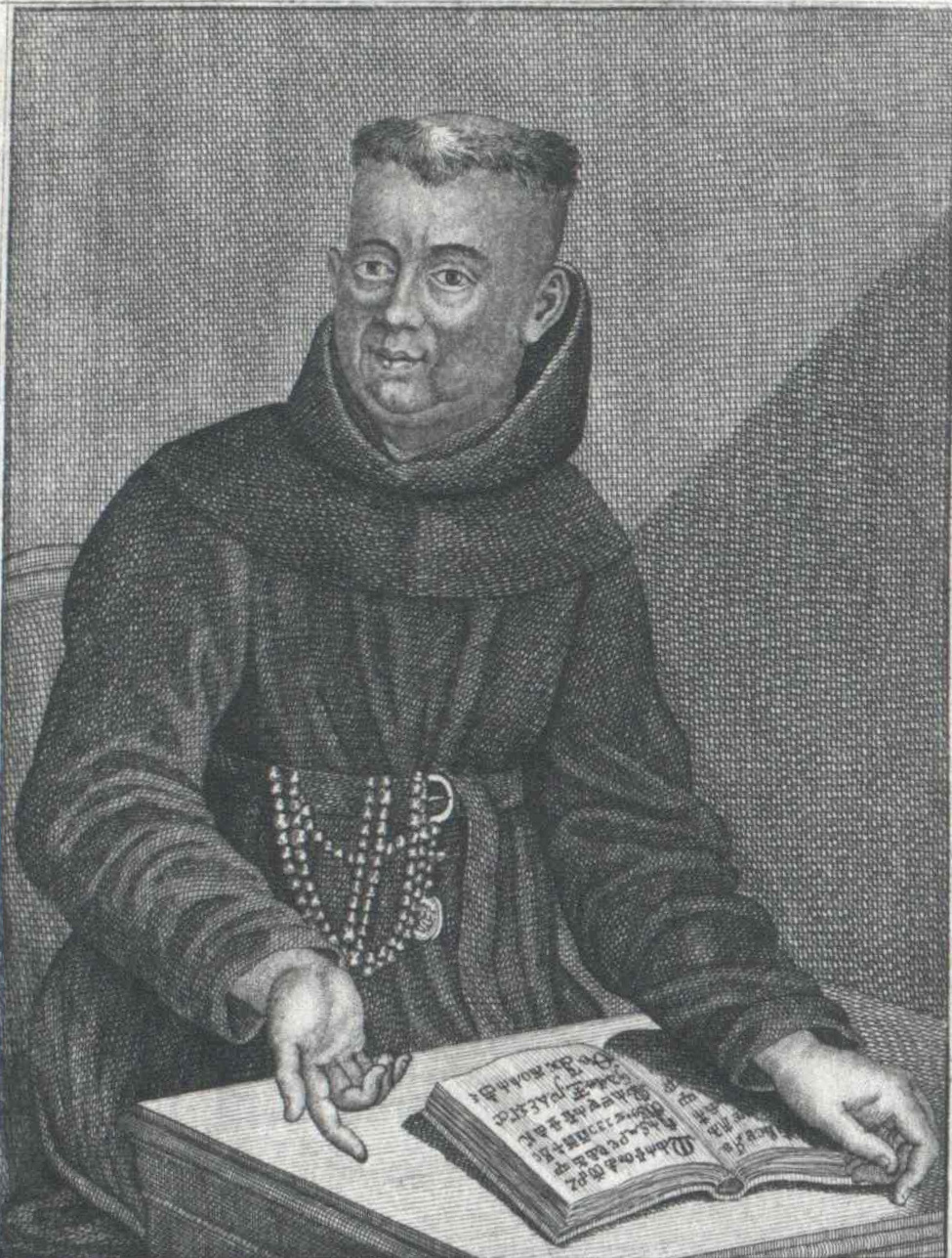 Marko Pohlin, Slovene philologist and priest.